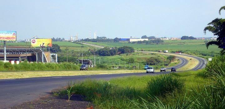 Rodovia SP-332, caminha à Paulínia.